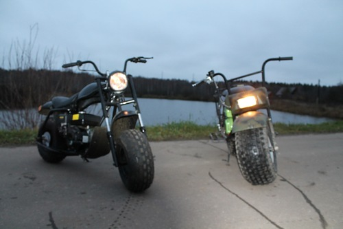 Мотовездеходы Куница200 и Атаман.